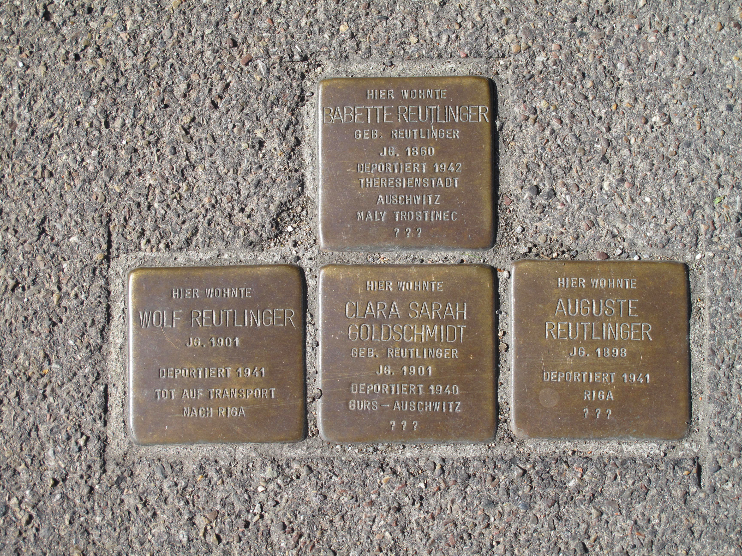 Stolpersteine in Baden-Württemberg, Kirchheim unter Teck, Jesinger Straße 18